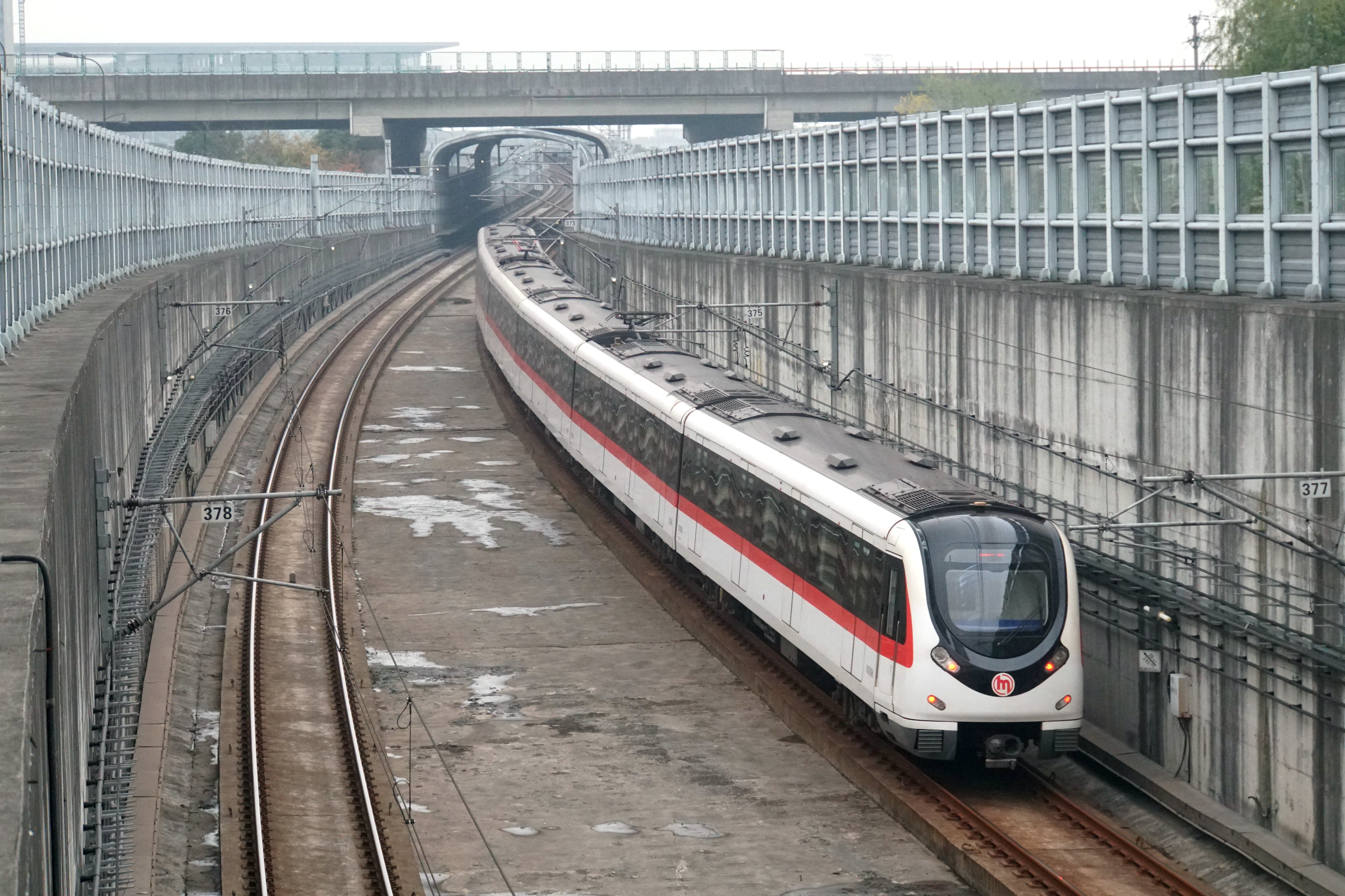 地铁1号线列车出地下隧道朝翁梅站驶去